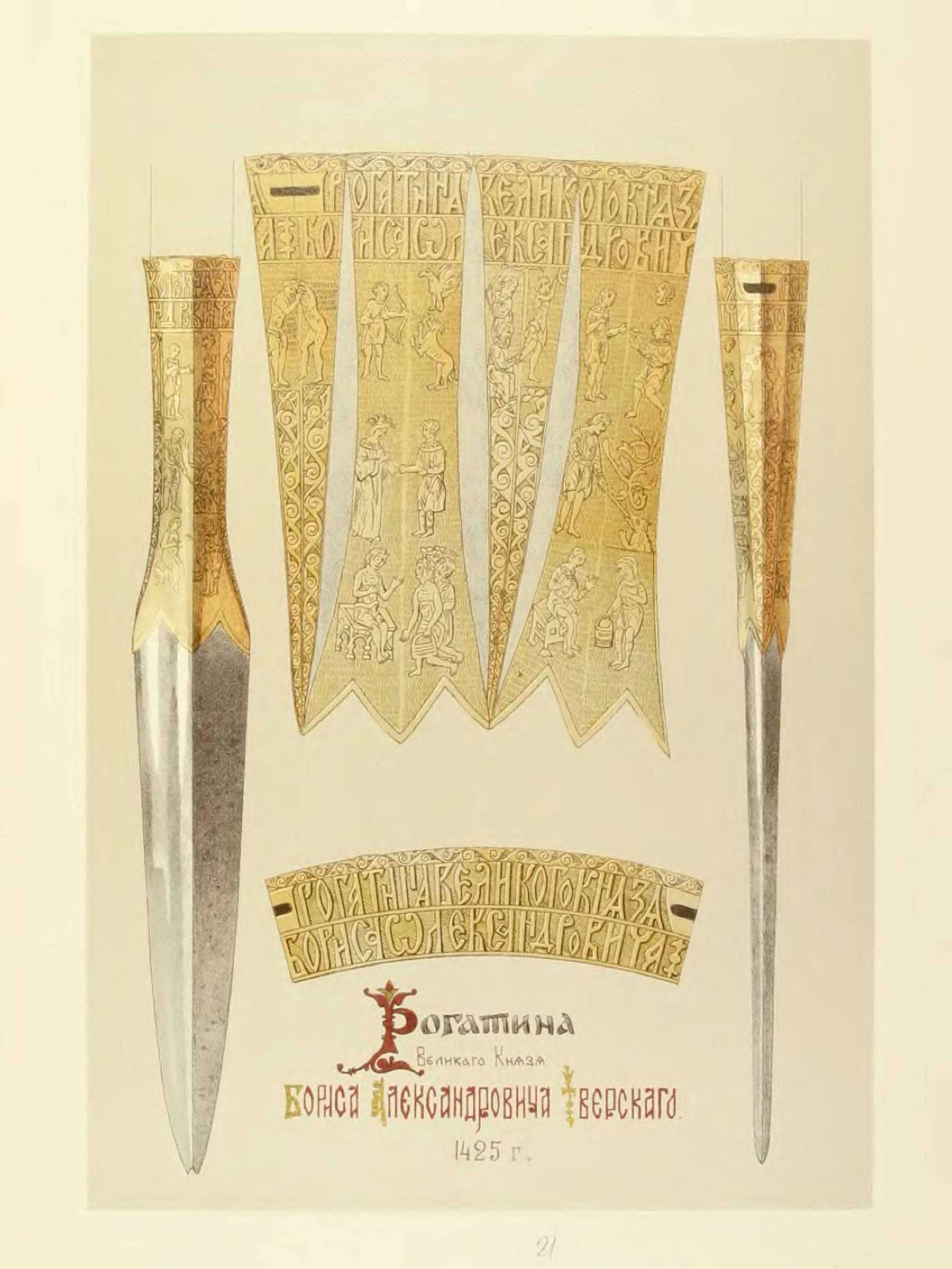 Рогатина великого князя Бориса Александровича Тверского. Из альбома Солнцева. Перепечатка в книге Кутепова